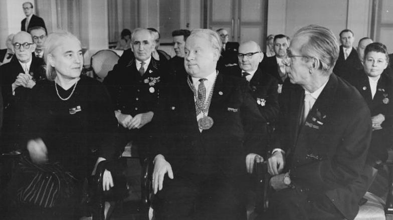 Berlin, Auszeichnungen, Seghers, Schröder, Nagel Zentralbild Zühlsdorf 19.12.1960 Berlin: Hohe Staatsauszeichnungen für verdiente Bürger der DDR Der Vorsitzende des Staatsrates, Walter Ulbricht, verlieh am 19.12.1960 einer Reihe verdienstvoller Bürger der Deutschen Demokratischen Republik hohe staatliche Auszeichnungen. UBz: Die Schriftstellerin und Präsidentin des Deutschen Schriftstellerverbandes, Dr. Anna Seghers (links), wurde mit dem Vaterländischen Verdienstorden in Gold ausgezeichnet. Rechts daneben: Professor Schröder, Rektor der Humboldt-Universität, Professor [Otto] Nagel, Präsident der Akademie der Künste. Abgebildete Personen: Nagel, Otto Prof.: Maler, Präsident der Akademie der Künste (AdK), Nationalpreisträger, Vaterländischer Verdienstorden (VVO) in Gold, DDR (PND 118586300) Seghers, Anna: Schriftstellerin, Präsidentin des Schriftstellerverbandes, DDR (PND 118612743)